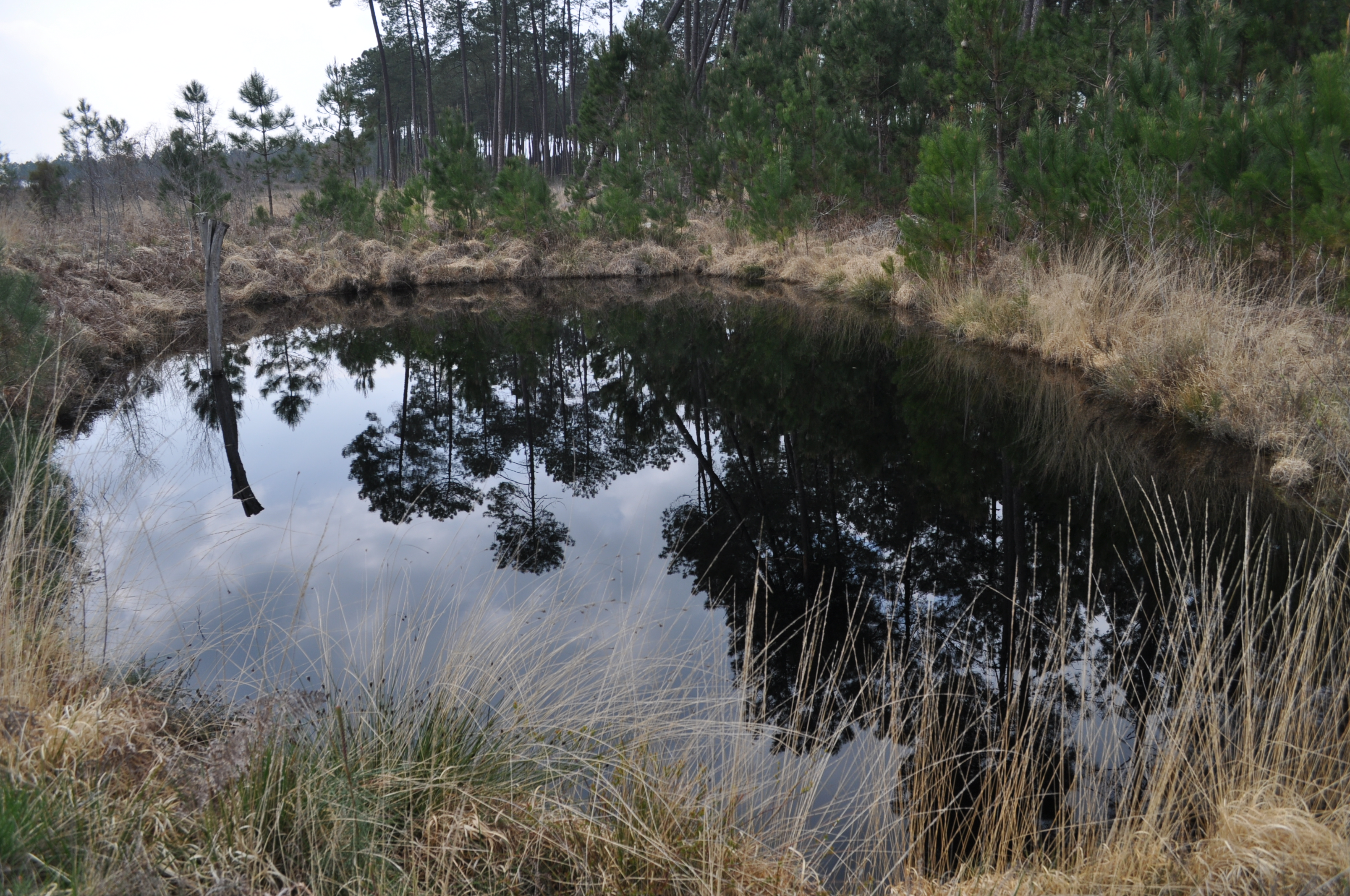 Trou ou l’eau ne s’assèche jamais ! Zone des lagunes